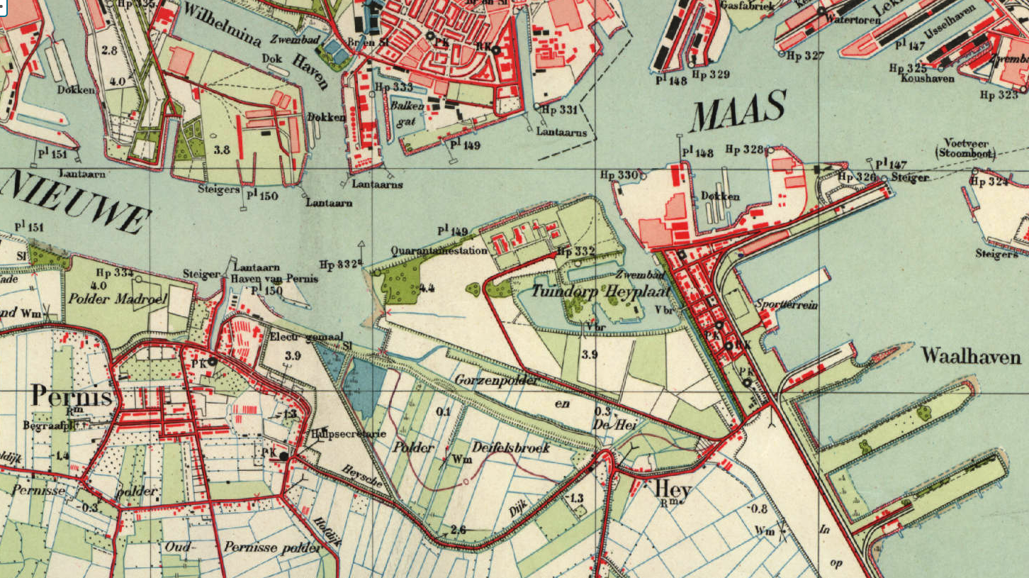 Fragment van topografische kaart schaal 1:25.000 rond Pernis. Dit is een gedeelte van de kaart Schiedam nr. 37G uitgegeven in 1940. Auteursrechten voorbehouden aan de Staat der Nederlanden. De kaart is dus nu Publiek Domein vanwege ouderdom.